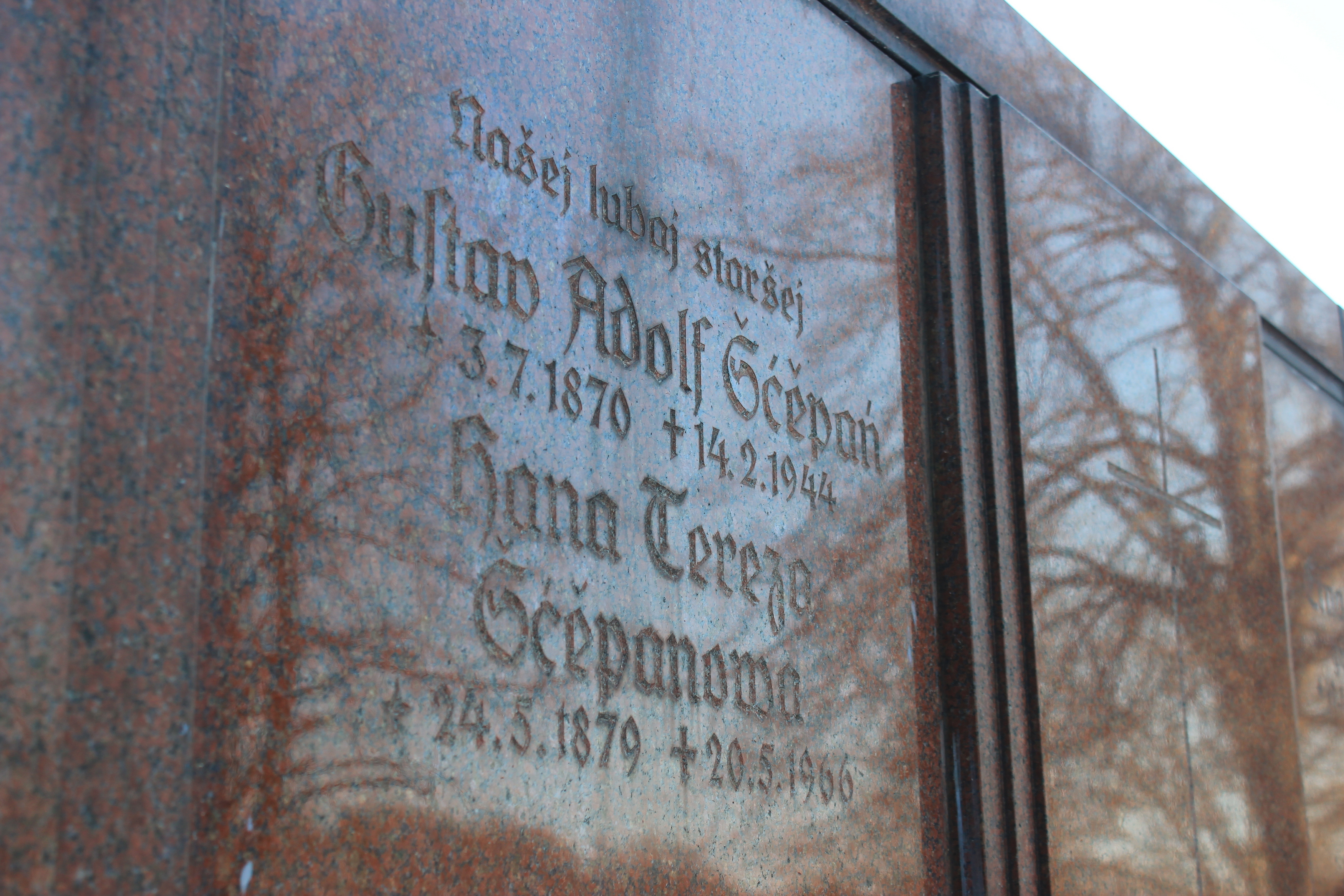 Hornjoserbsce: Narowny kamjeń w Poršicach.